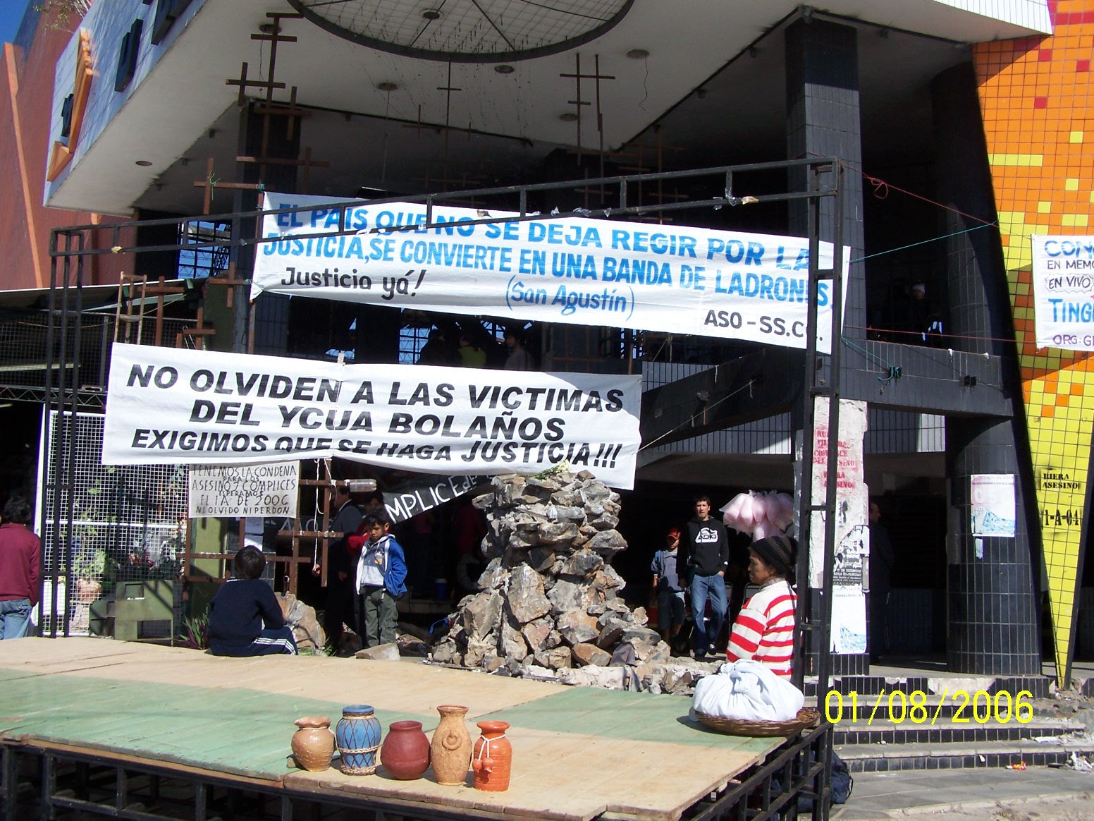 Entrada principal al supermercado Ycuá Bolaños V. Ubicado entre las Avenidas General Artigas c/ Santísima Trinidad del Barrio Trinidad de Asunción, Paraguay, donde el 1 de agosto de 2004 murieron 396 personas por el cierre de puertas. En la foto se puede ver pancartas de repudio, pidiendo justicia, además un escenario montado para la conmemoración del primer aniversario (01-08-2006).